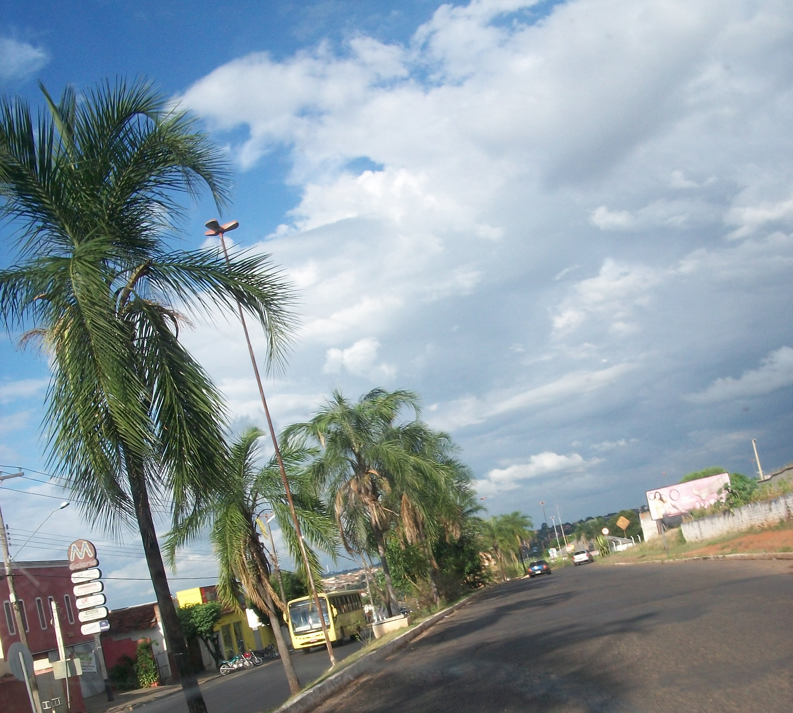 Rua dos Fundadores em Araçatuba. É possível ver um ônibus da Transportes Urbanos Araçatuba à esquerda e mínima parte da zona leste do município bem ao fundo.